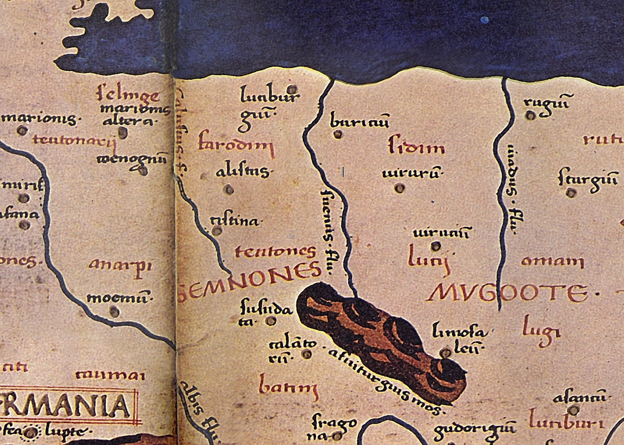 Der Ortsname "ALISO" (hier alistus), Detailbild von der Karte zur Germania magna.